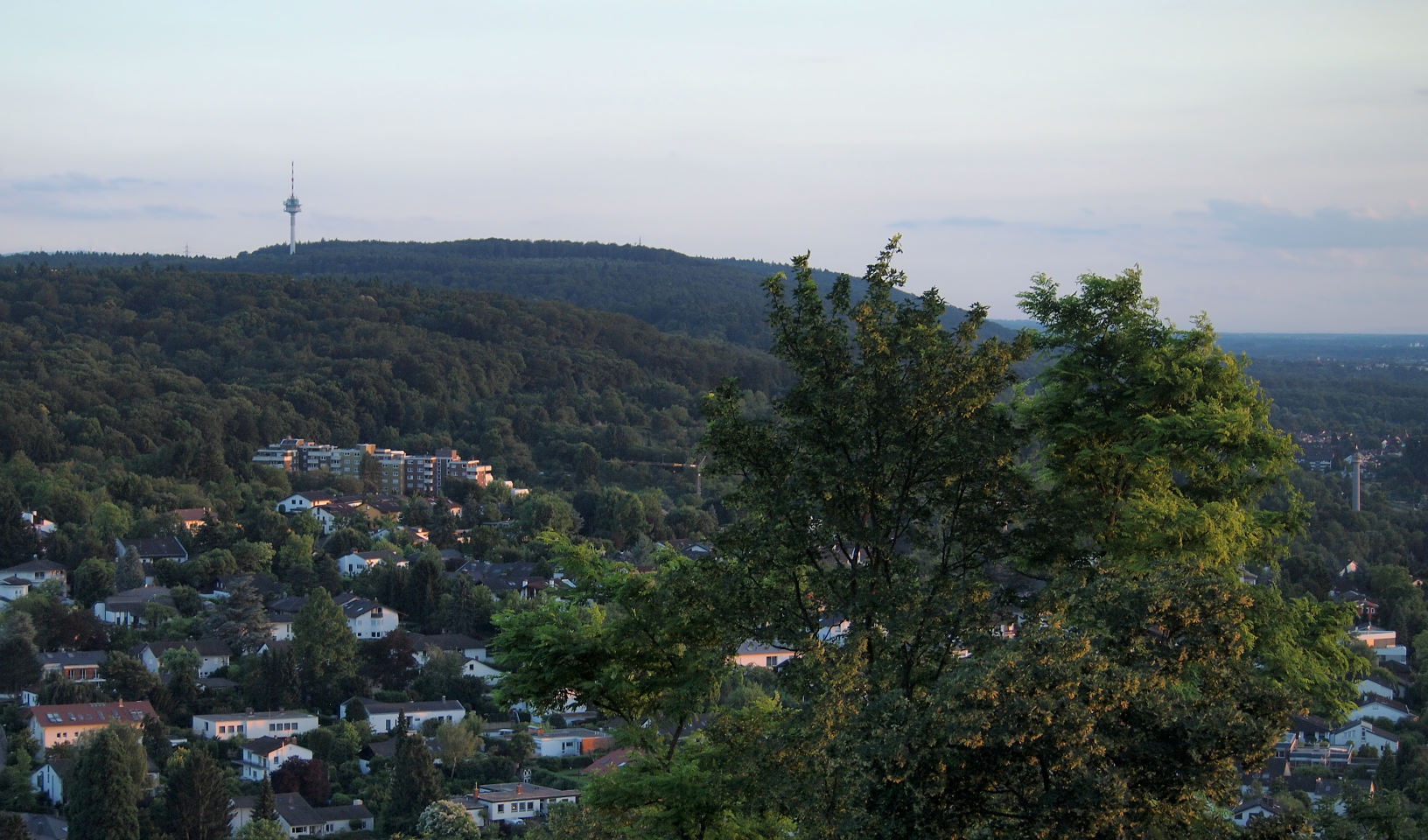 Der Durlacher Geigersberg (links), im Hintergrund Edelberg/Wattkopf (Spitze des Senders) von Turmberg gesehen